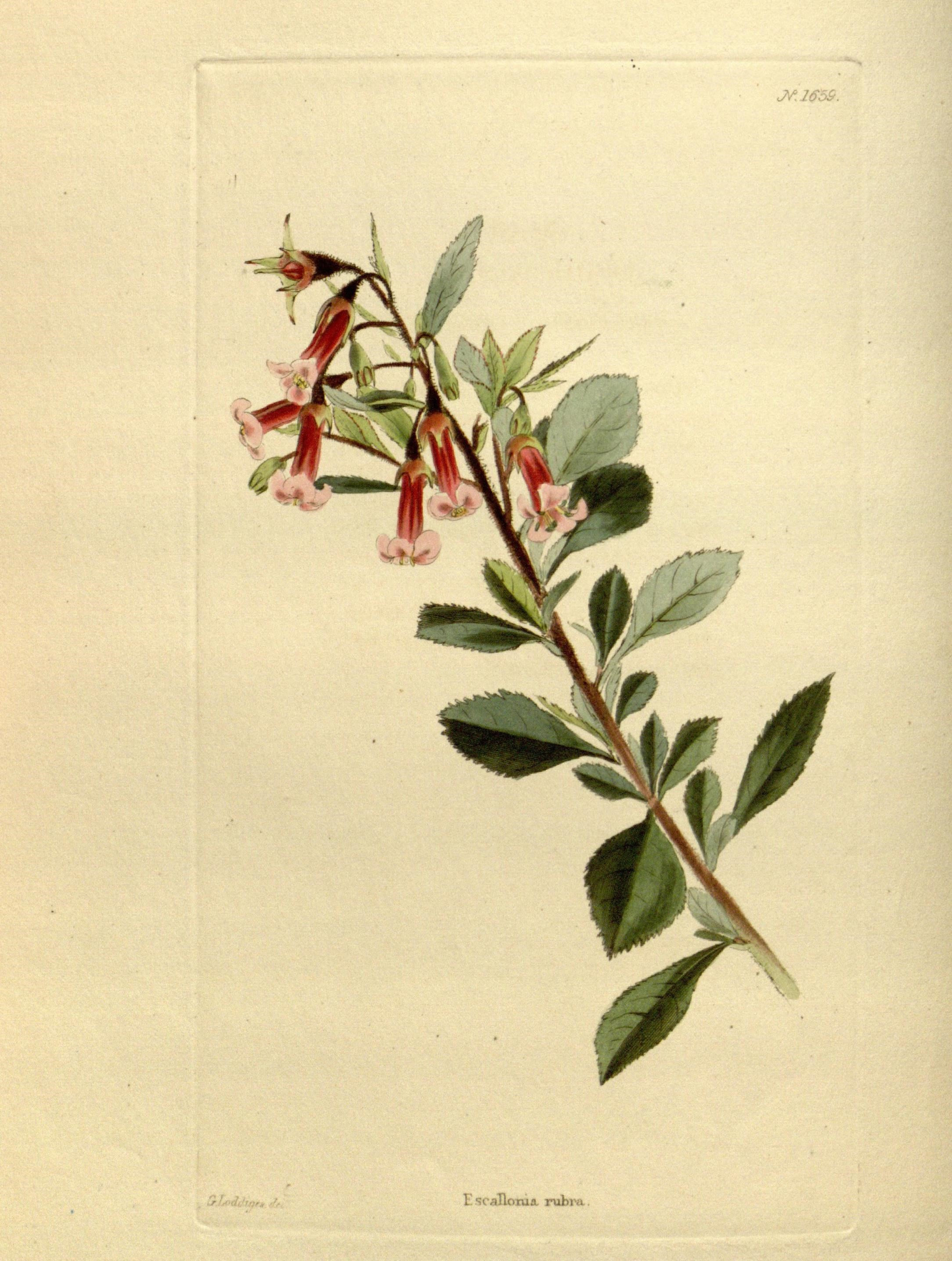 j^-ieo9. / EscaTloTua rubr^